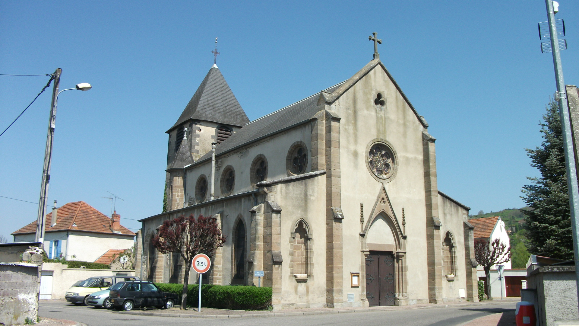 Église d'Hauterive, Allier, Auvergne, France.